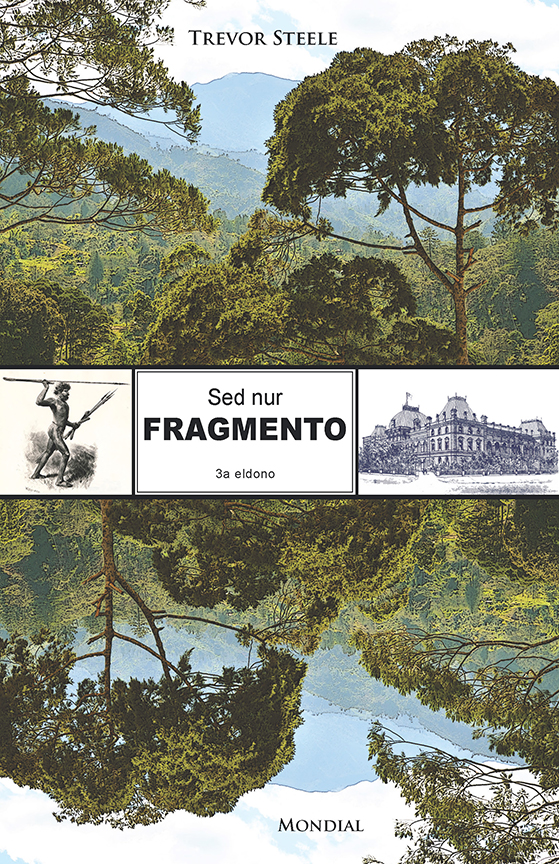 Kovrilo de la 3a eldono de la romano de Trevor Steele